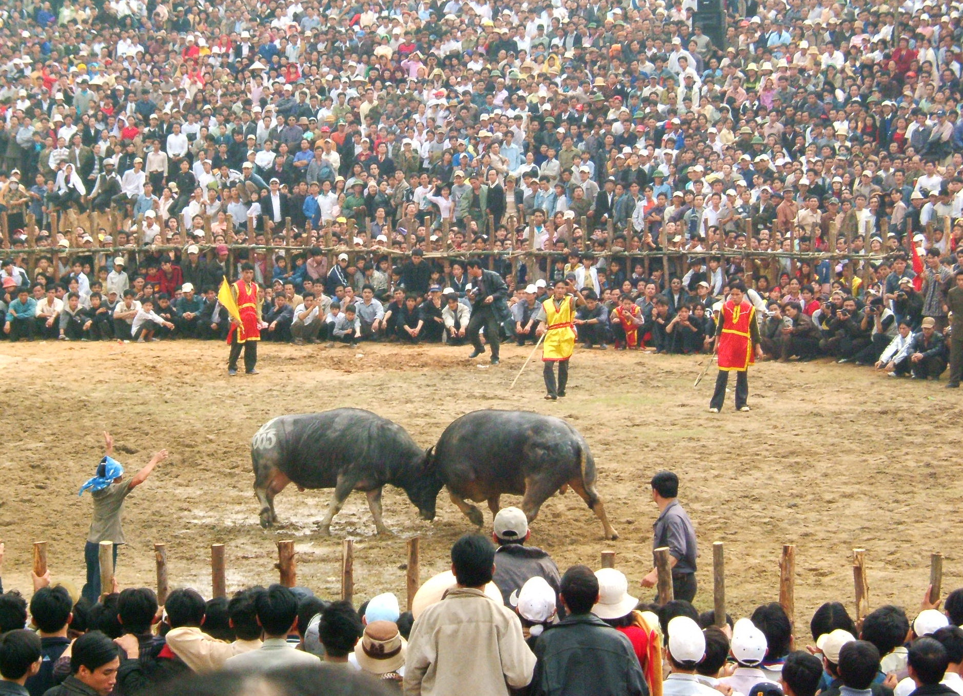 Quang cảnh một lễ hội chọi trâu tại xã Hải Lựu, huyện Lập Thạch, tỉnh Vĩnh Phúc. Lễ hội này được tổ chức hàng năm vào ngày 17 tháng Giêng. Ảnh do Khương Việt Hà chụp và hiến cho Wikipedia.